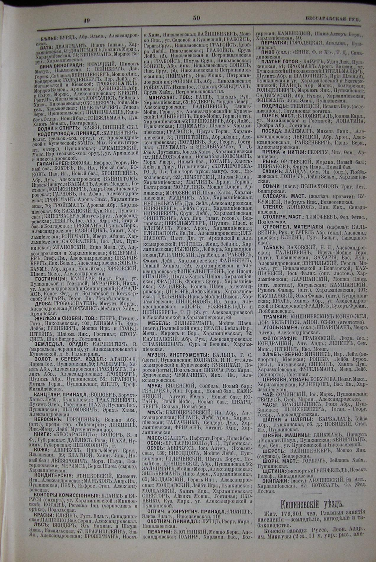 Стр. 49-51 (Кишинёв и Кишинёвский уезд) из адрес-календаря Российской империи "Вся Россия", 1902.